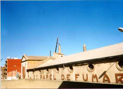 Fábrica de papel de fumar Paya en Mislata (Valencia, España)